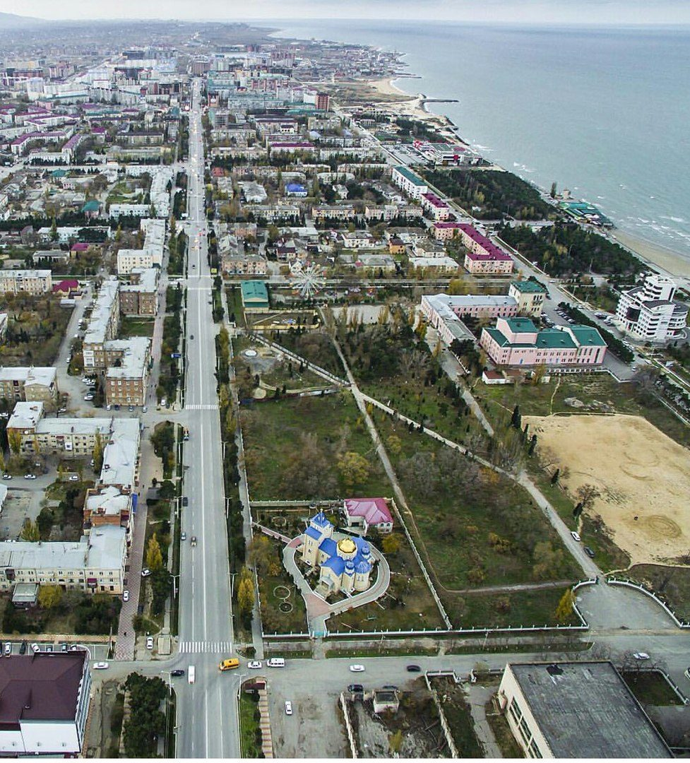 Kaspiysk